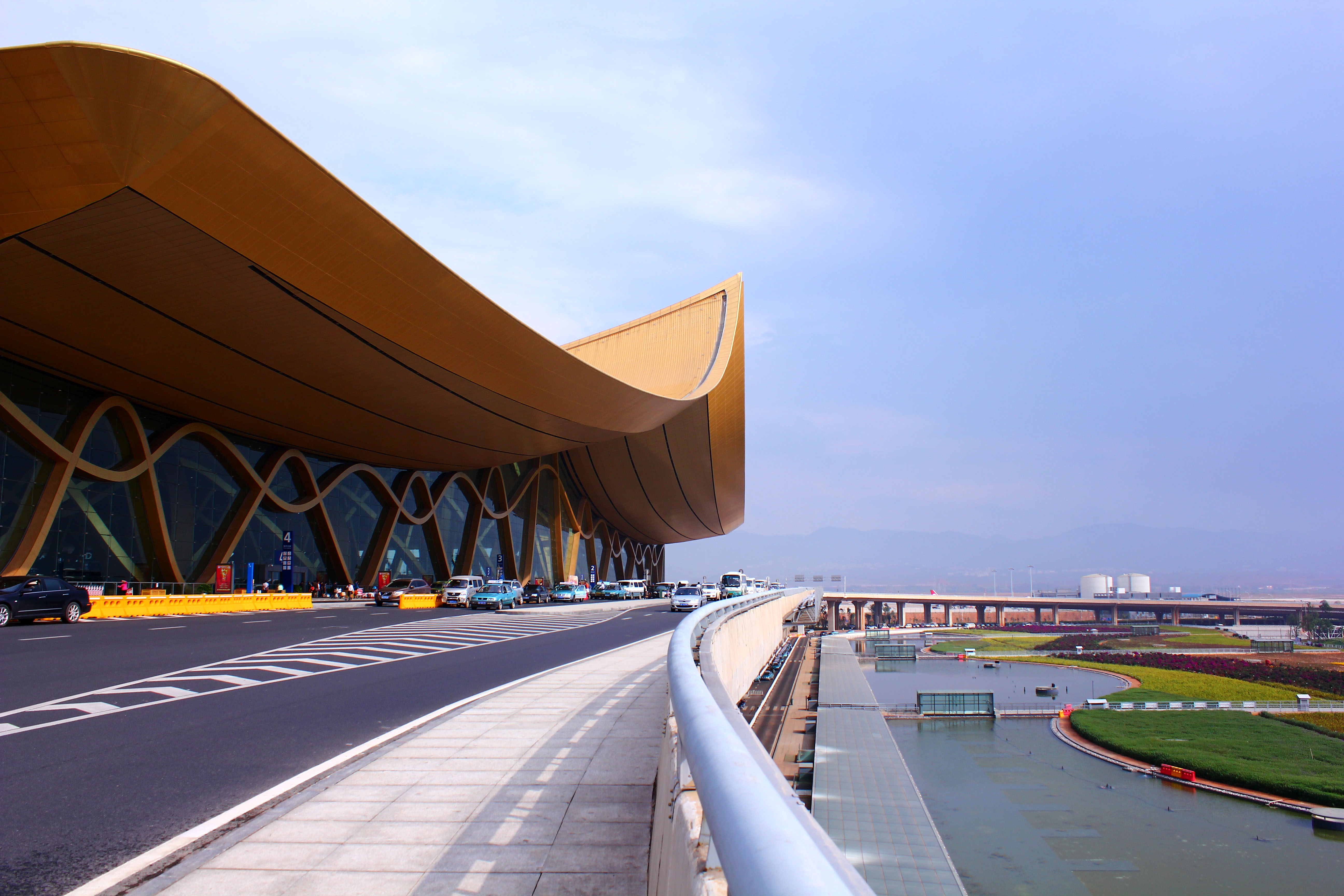 昆明长水机场航站楼。